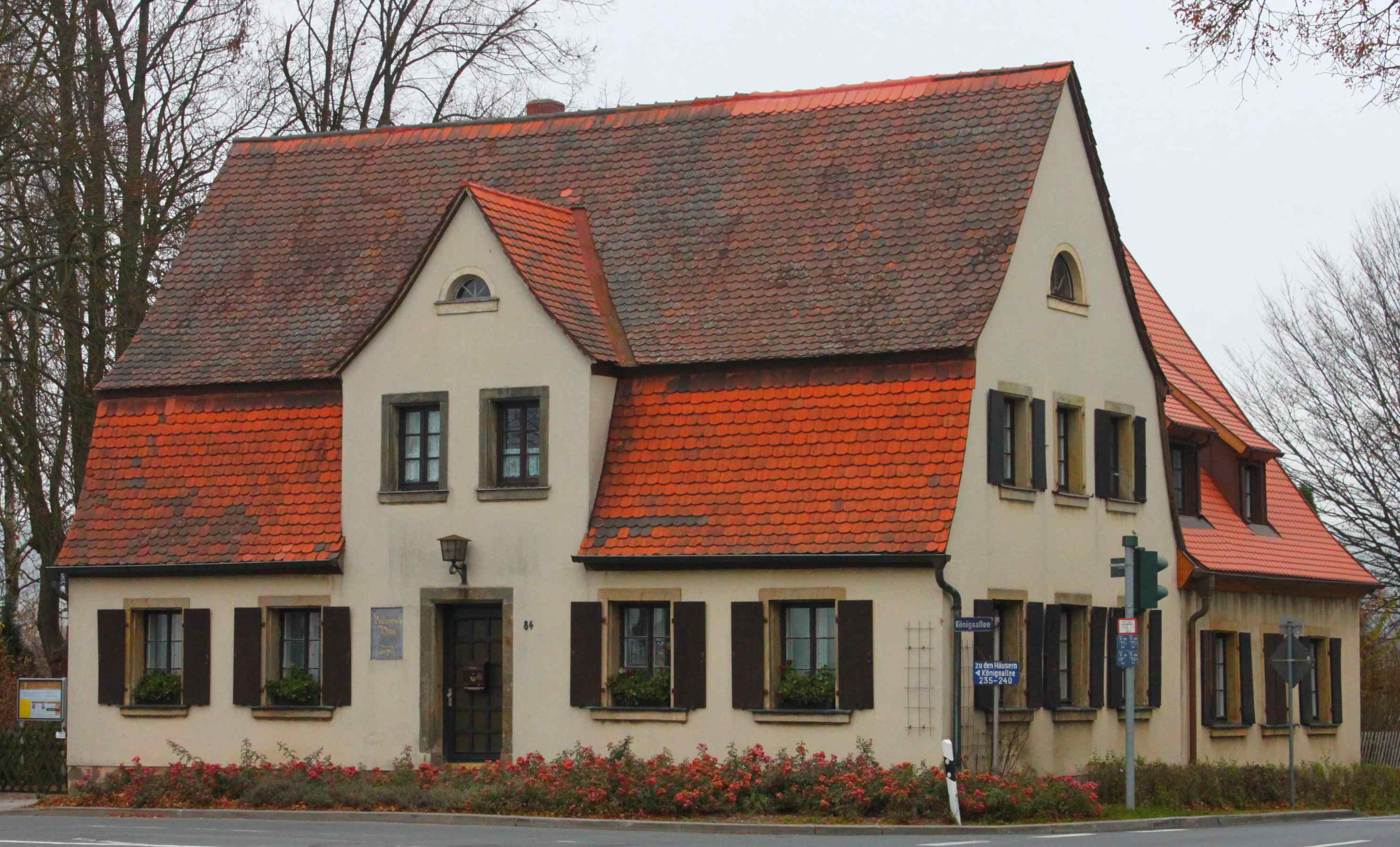 Die Jean Paul Stube in der Rollwenzelei in der Königsallee in Bayreuth ist geöffnet von Mai bis Oktober